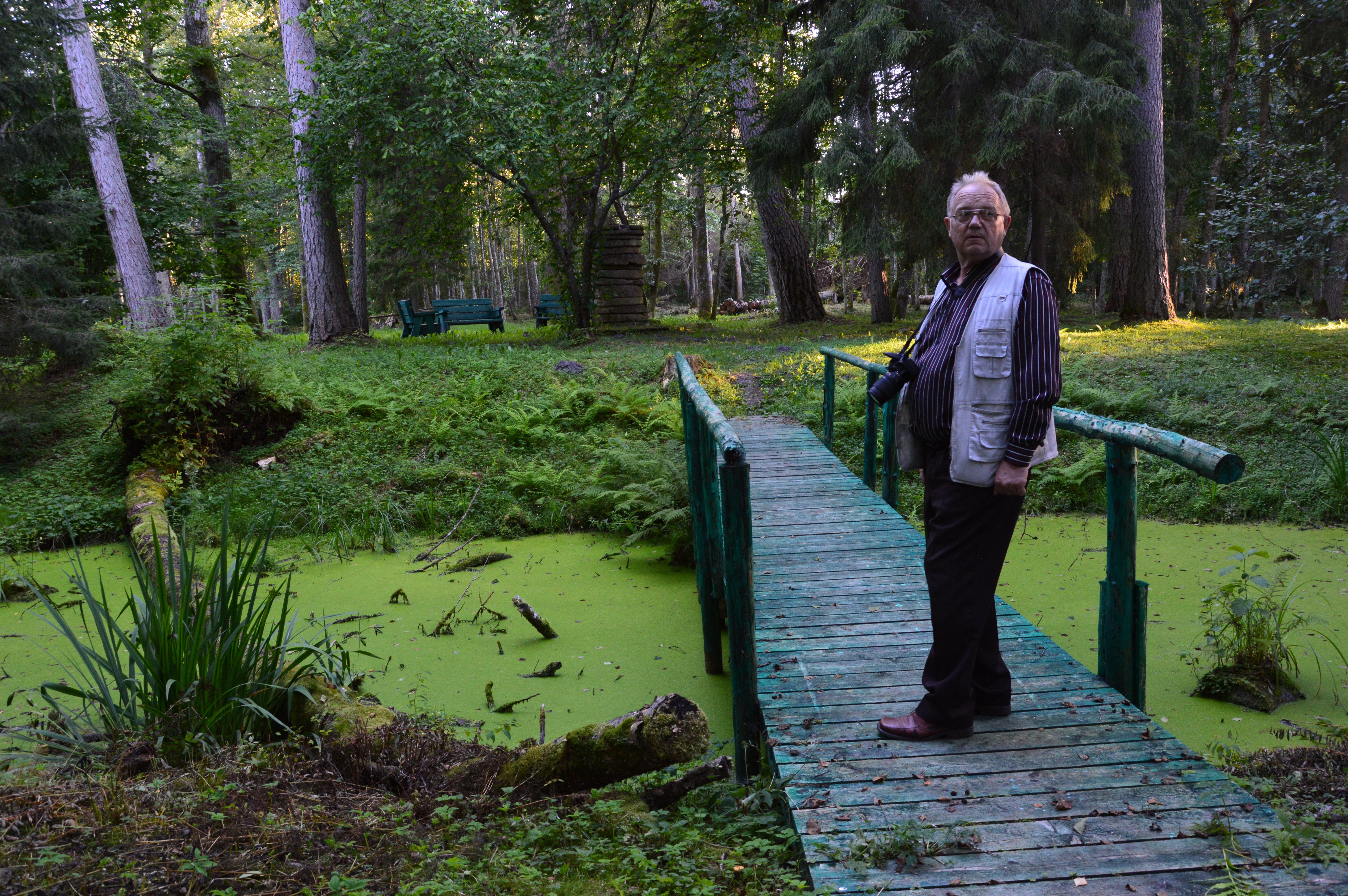 Jaan Viska Hirvepargis.